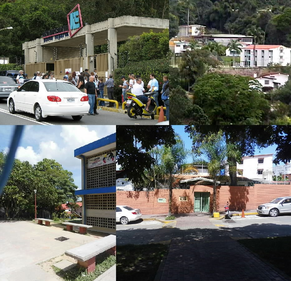 Imagenes: Universidad Nueva Esparta (Los Naranjos) Seminario San Jose (Los Geranios - El Hatillo) Unidad Educativa Nacional Conopoima (La Lagunita) Unidad Educativa Nacional Juan Manauel Cajigal (El Hatillo)